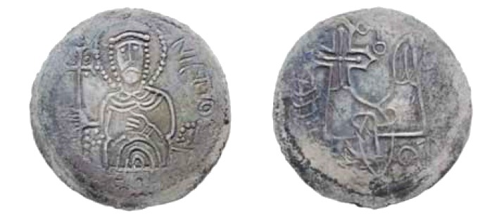 Coin of Kievan knyaz Sviatopolk I Vladimirovich, silver «srebrenik». Сребреник Святополка Владимировича, из клада, обнаруженного в Черниговской обл. в 2006 г. Вес 2.87 г, диаметр 26.5 мм, проба серебра 796.